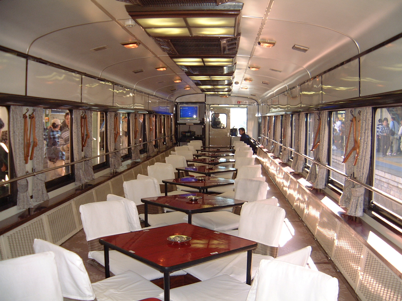 ふれあいパル車内